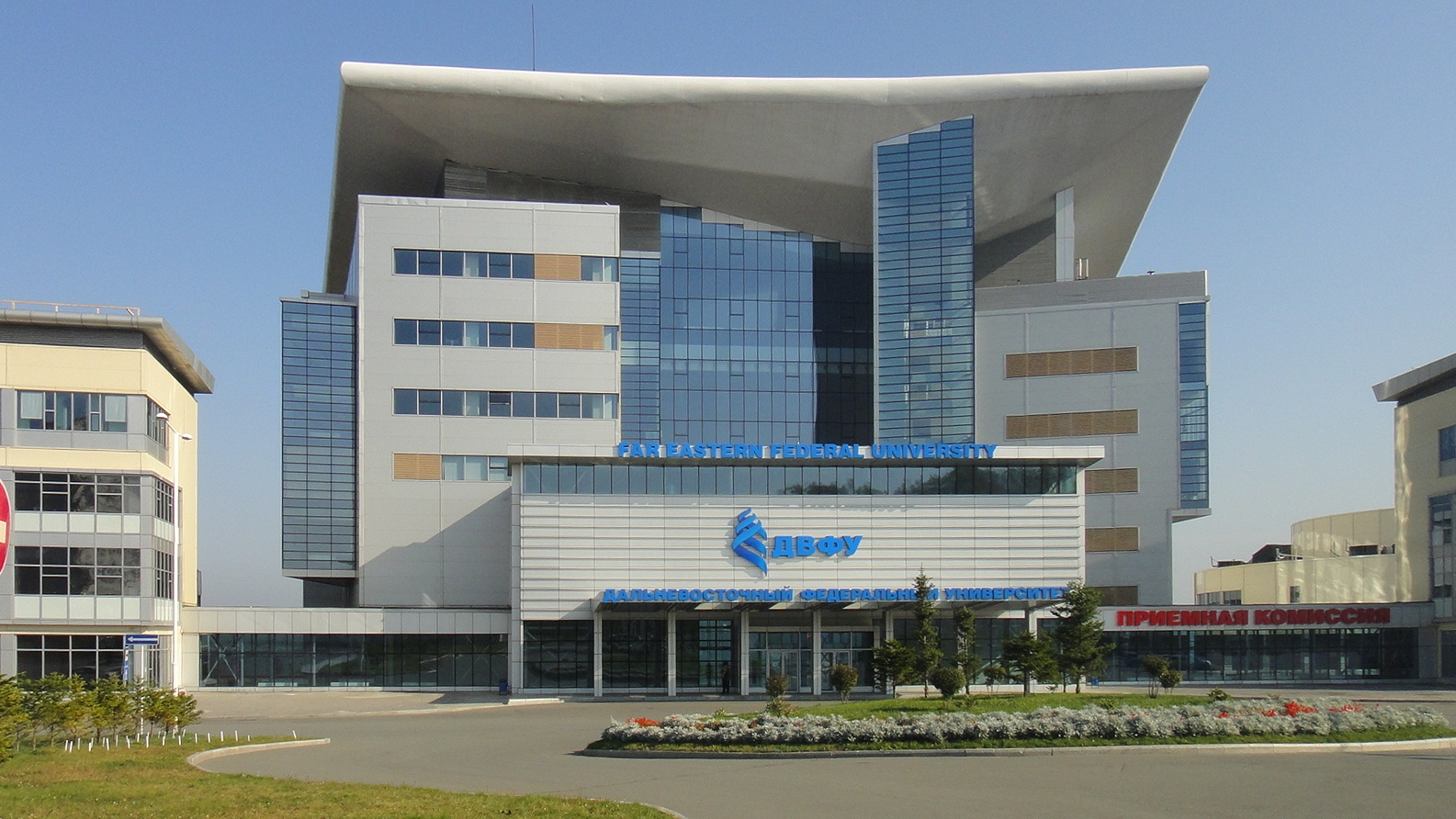 Дальневосточный федеральный университет